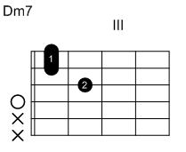 Eigenanfertigung